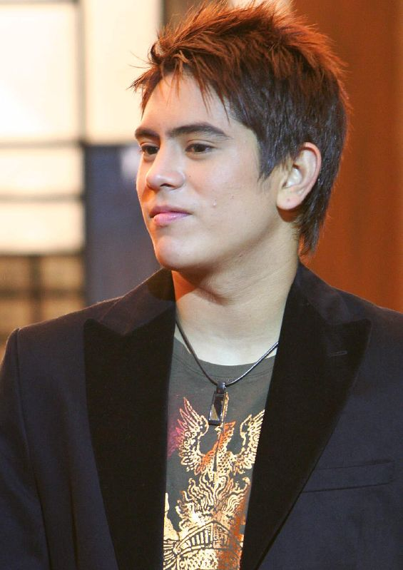 Gerald Anderson